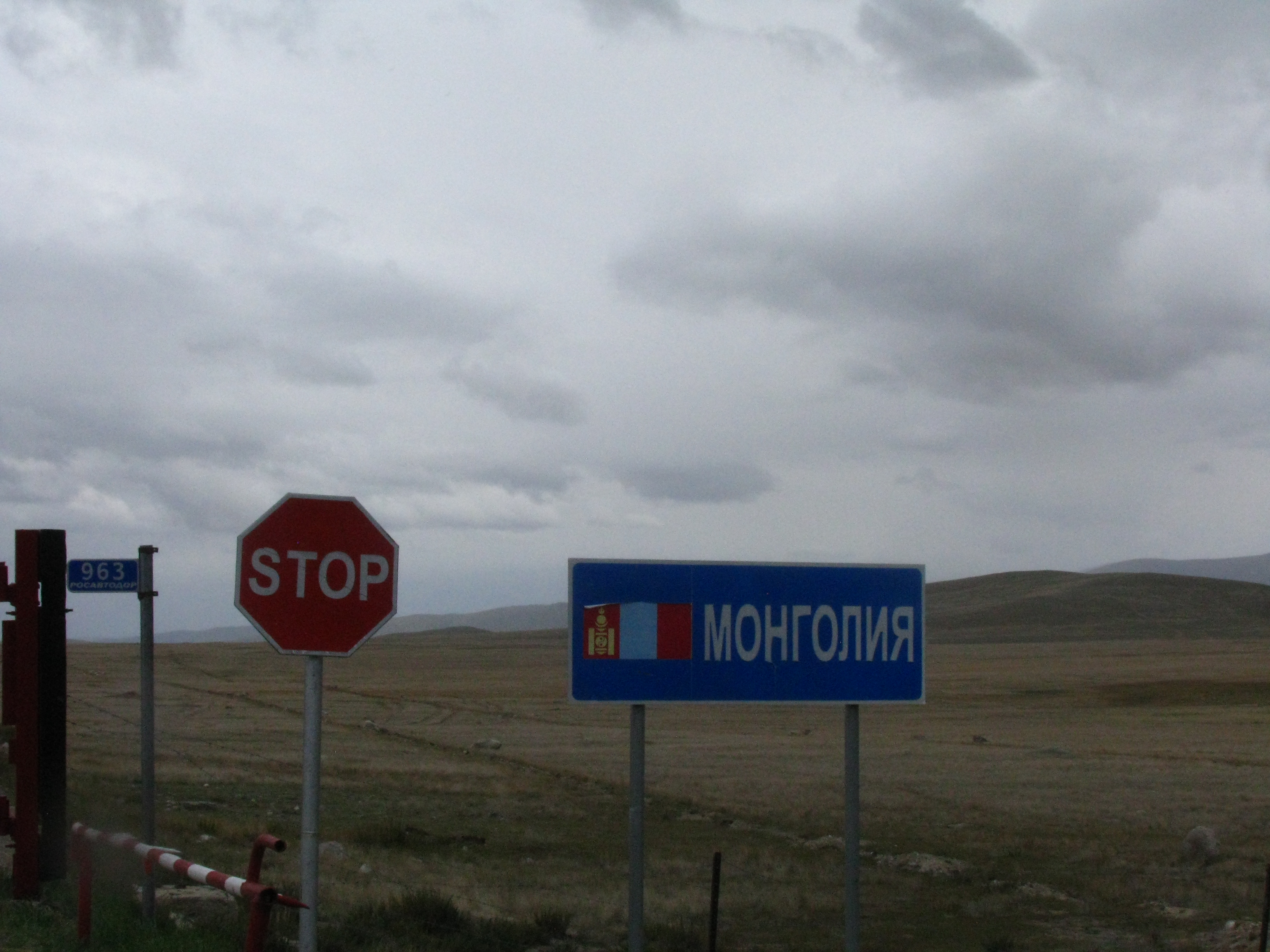 Последний километровый столбик трассы М-52